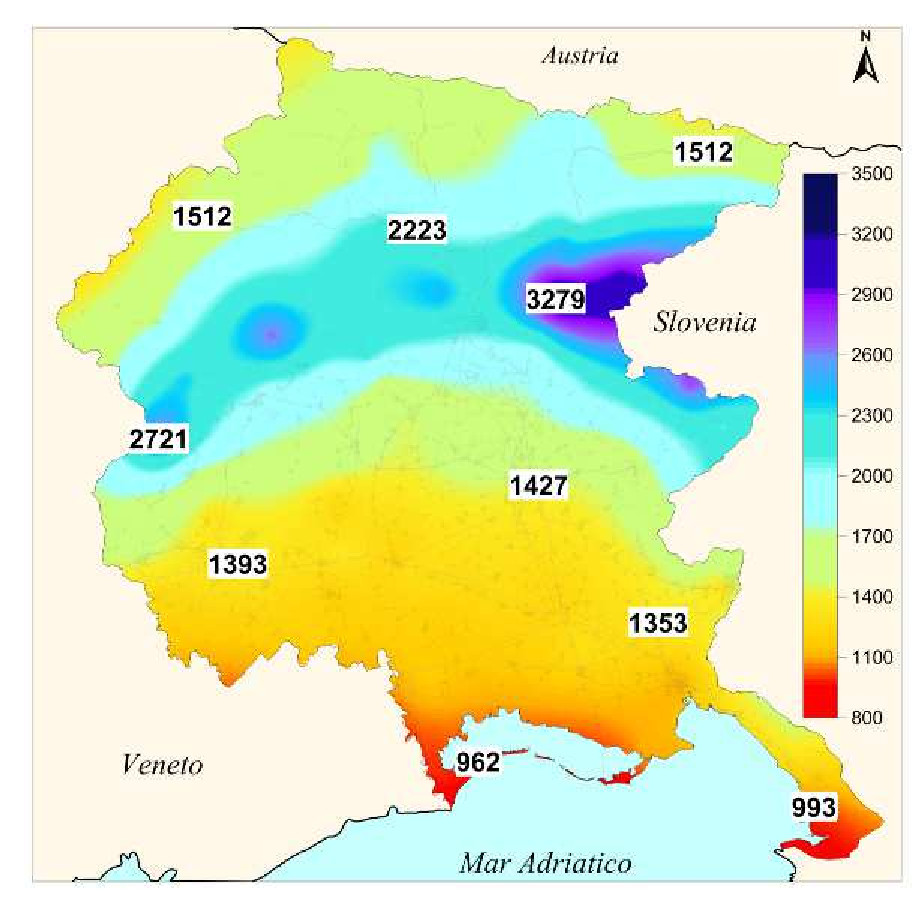 Friuli Venezia Giulia - Precipitazioni medie annue (dati rete meteorologica regionale 1961-2013).jpg